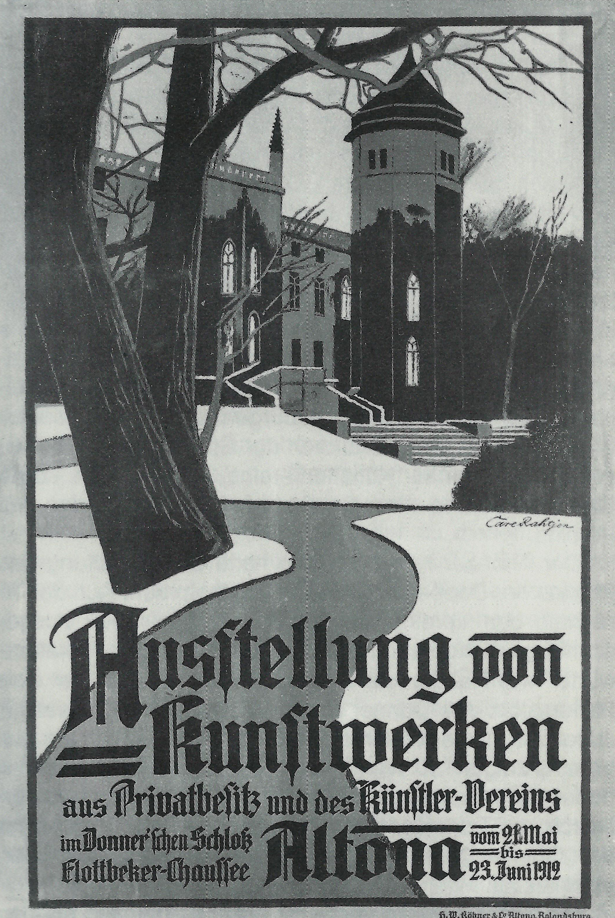 Schwarz-weiß-Abbildung eines Ausstellungsplakts des Altonaer Künstlervereins, 1912. Entwurf von Carl Rathjen, Lithografie, 81,5 × 53,5 cm. Altonaer Museum, Inv. Nr.: AB 8211